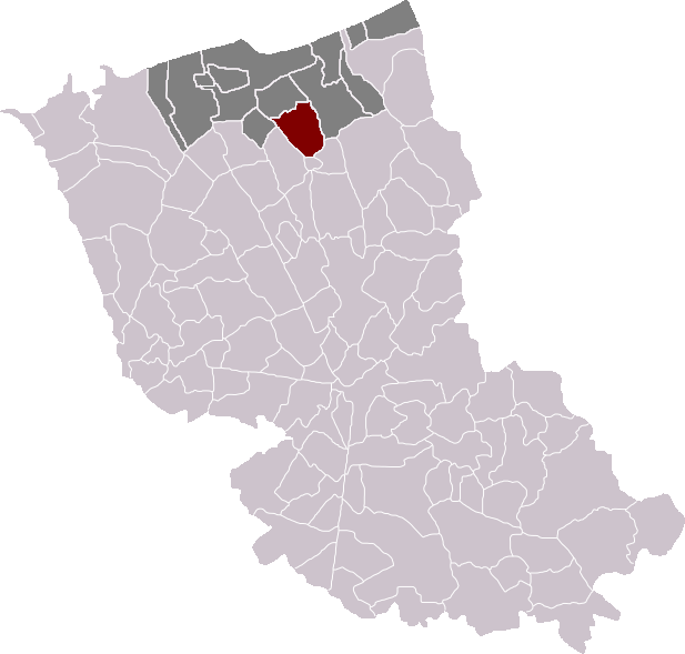 Locatie gemeente Koudekerke(-Dorp) in arrondissement Duinkerke. Zelfgemaakt. Location of Coudekerque(-Village) municipality in the arrondissement of Dunkirk. Self made. Localisation de la commune de Coudekerque(-Village) dans l'arrondissement de Dunkerque. Fait moi-même.